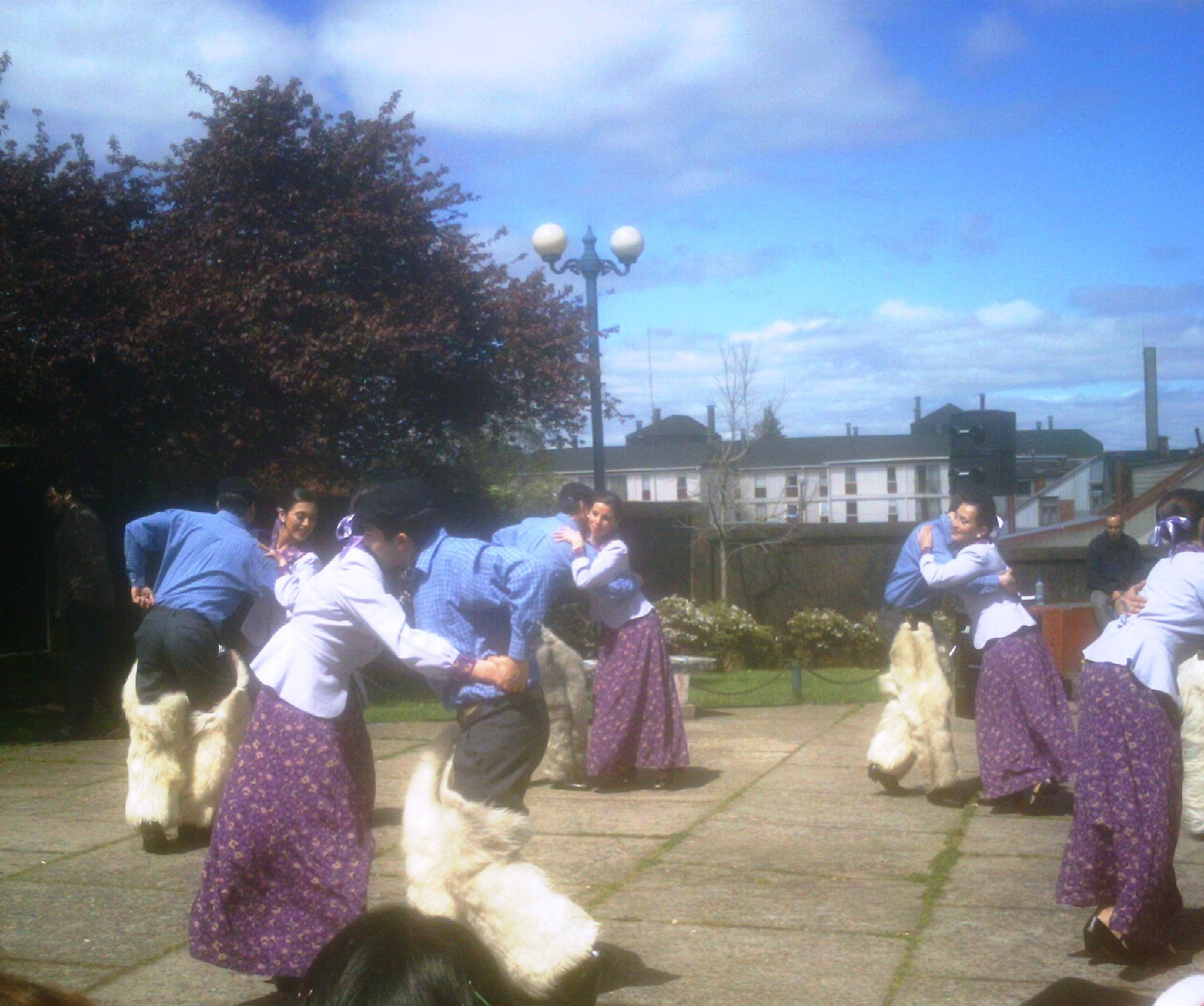 Integrantes del Ballet Folklórico de la Universidad Austral de Chile, bailando chamamé en Valdivia. En Chile, el chamamé es un baile en la Patagonia.